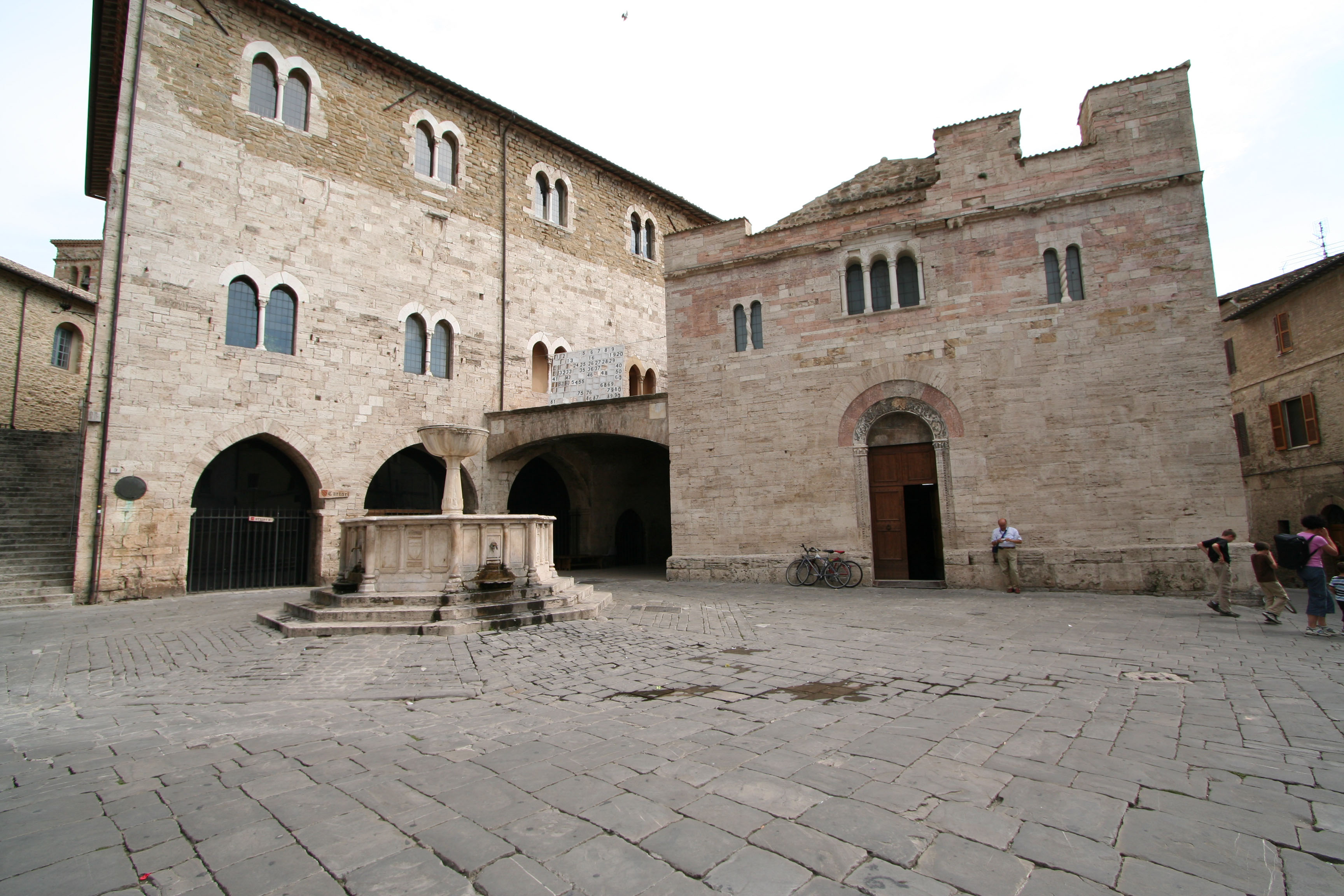 Descrizione: Bevagna, piazza Silvestri Origine: Fotografia scattata da me Data: 25.08.2006 Autore: utente:marcvsrvs